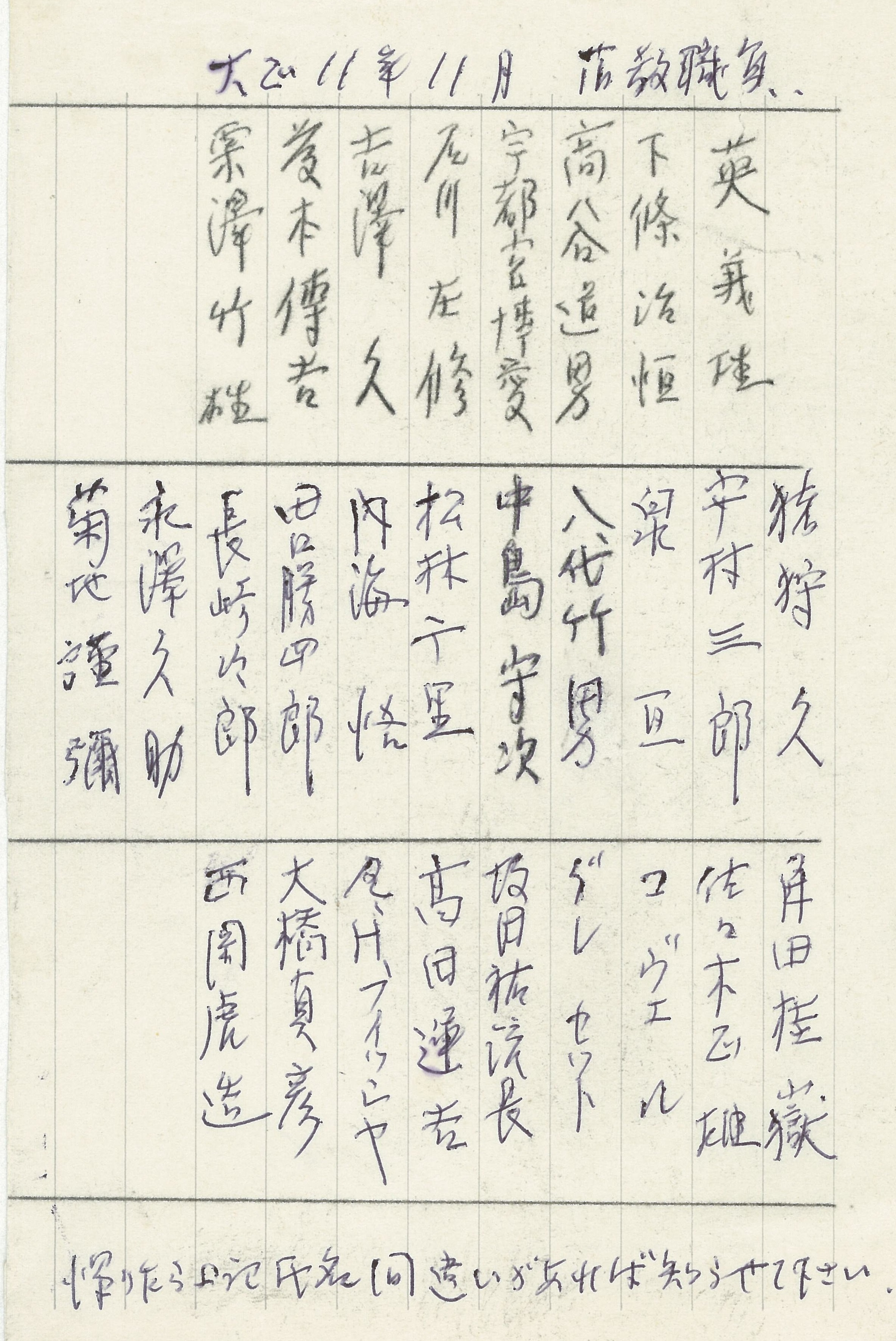 中学関東学院設立（1919年） 初期の教職員（1921年11月）